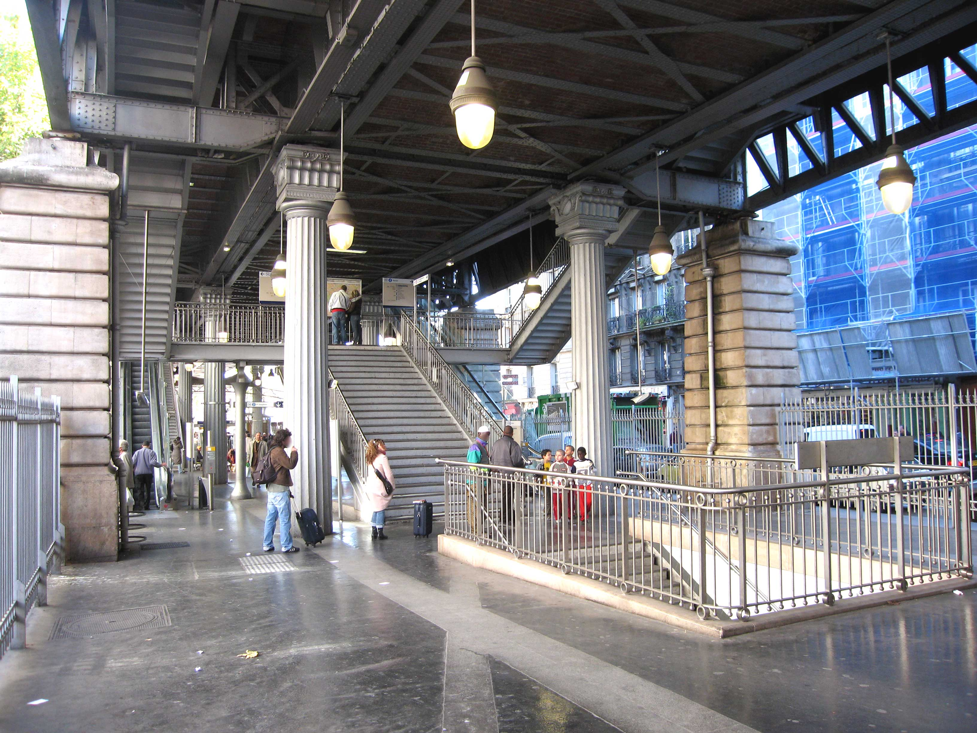 Métro de Paris, Sous le viaduc, Station Barbes Rochechouart (ligne 2), Paris, France